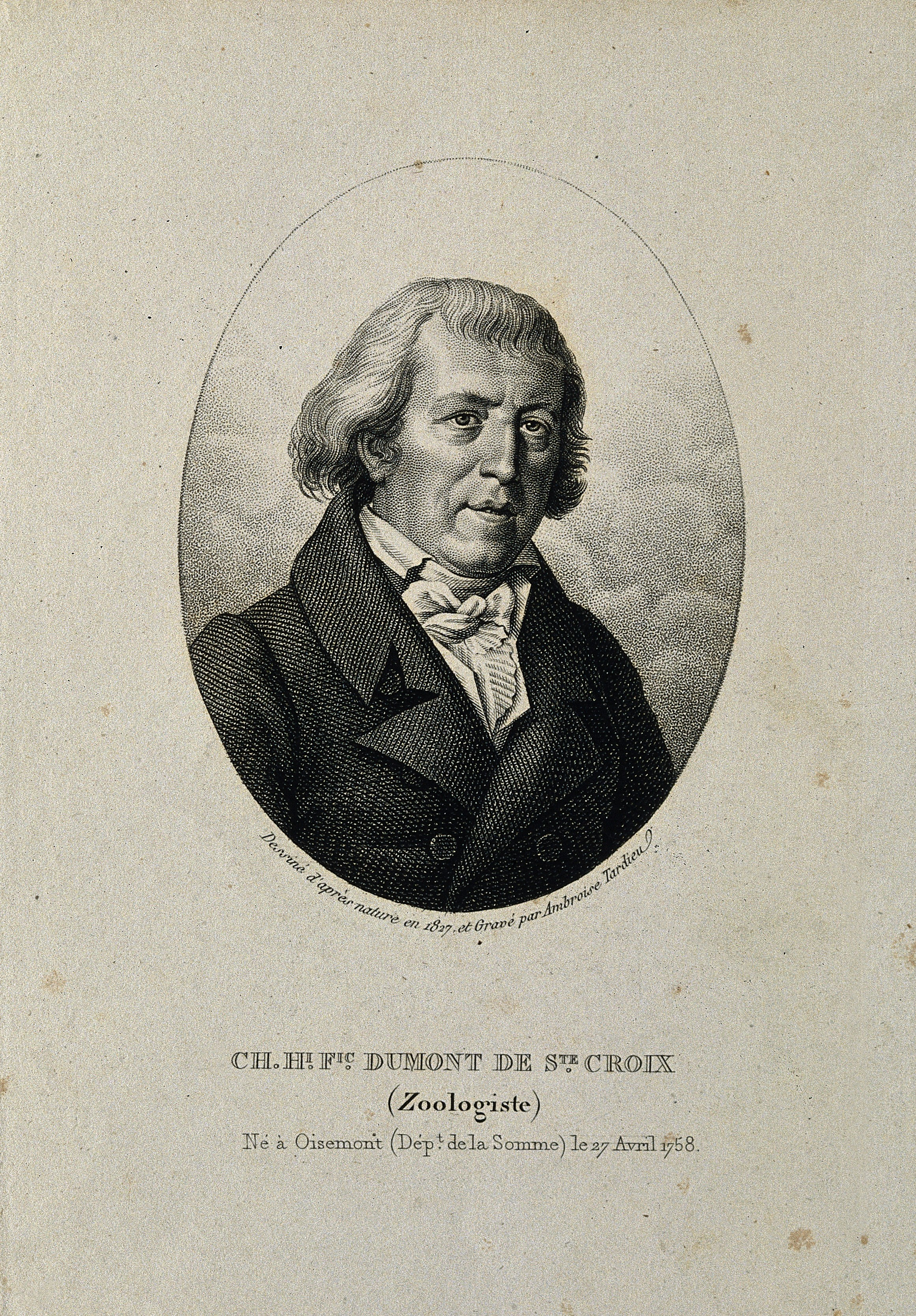 Charles-Henri-Frédéric Dumont de Sainte Croix. Stipple engraving by A. Tardieu, 1827, after himself. Iconographic Collections Keywords: portrait prints; Ambroise Tardieu; Charles-Henri-Frédéric Dumont de Sainte Croix; stipple prints